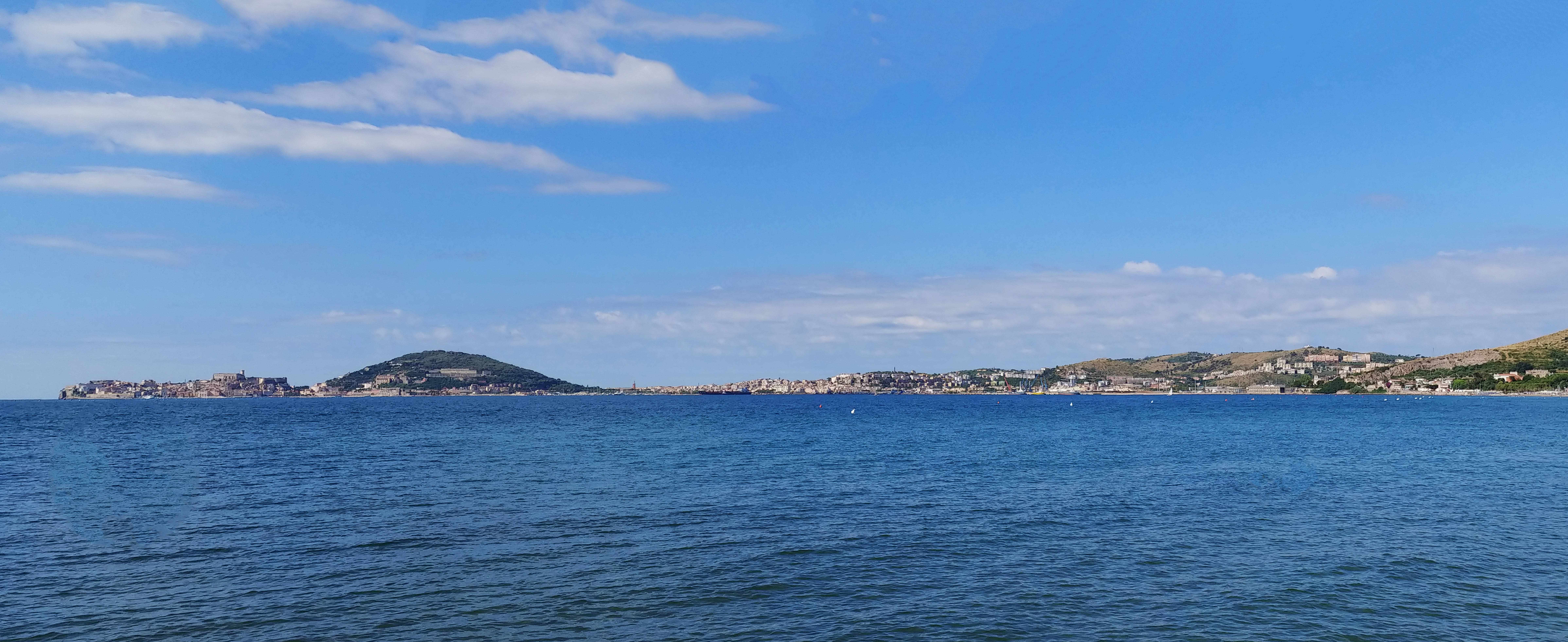 Panorama di Gaeta da Vindicio.